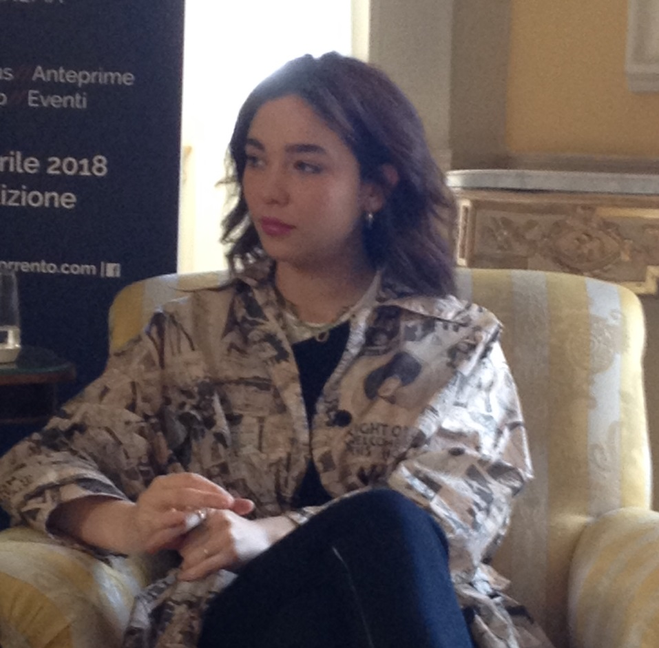 Matilda De Angelis agli Incontri Internazionali del cinema di Sorrento 2018 per l'anteprima nazionale di Youtopia